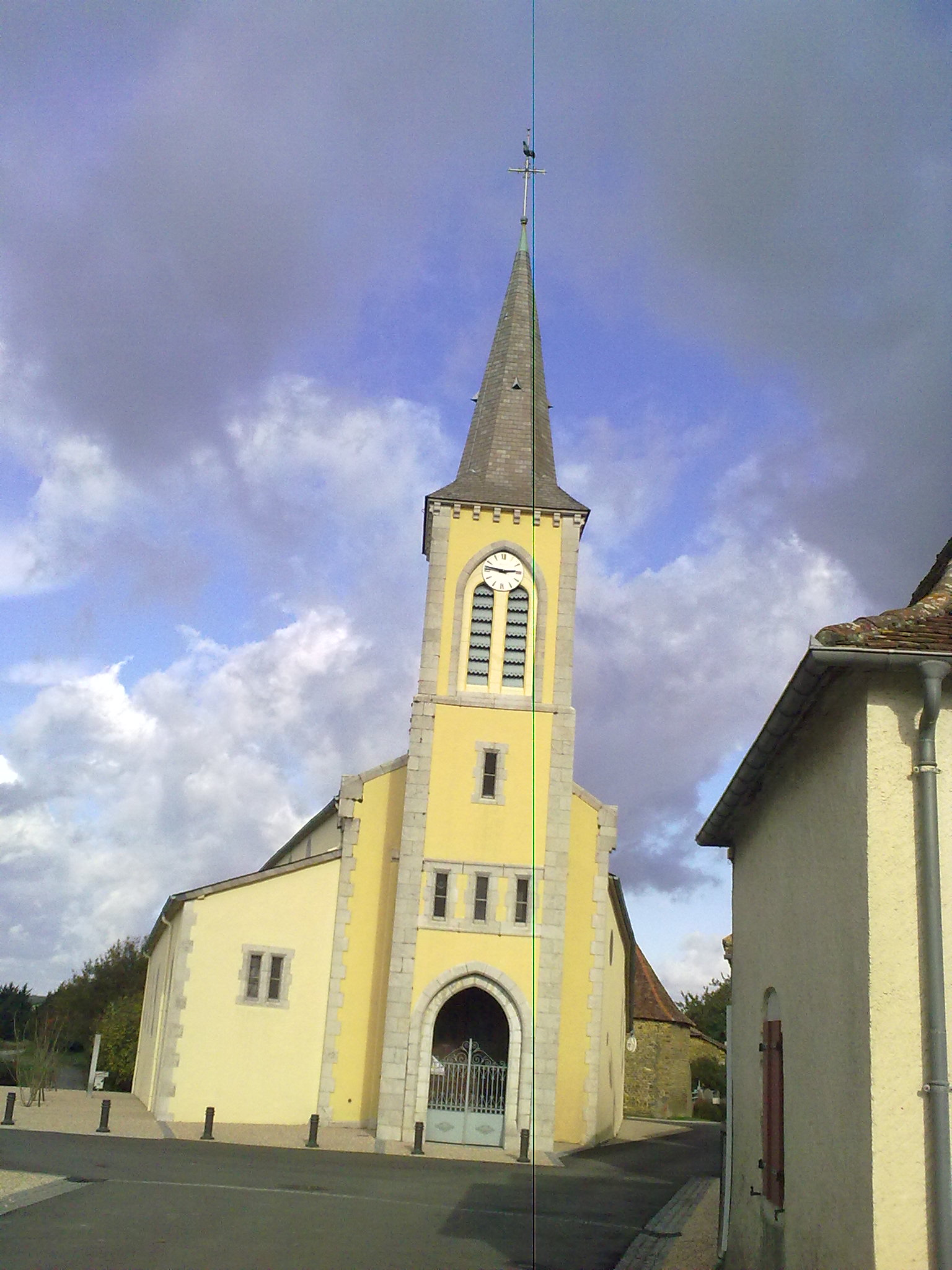 Mesplède